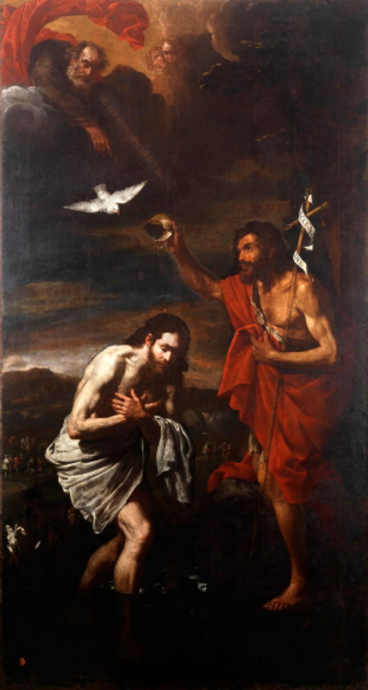 Battesimo di Cristo